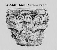 Chapiteau du temple de la déesse Maura à Albulae - Dessin de Louis Demaeght paru dans le bulletin de la Société de géographie et d'archéologie de la province d'Oran en 1893 (page 244)